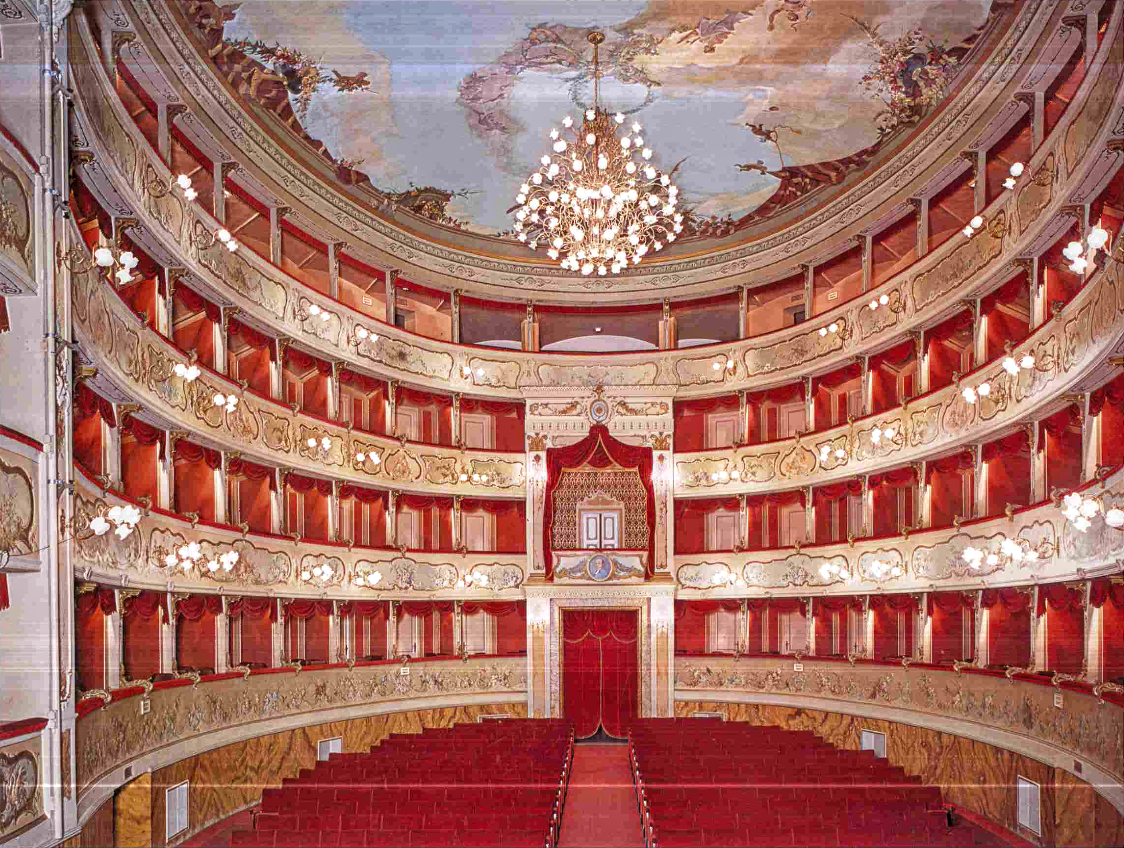 Interno del teatro Asioli a Coreggio